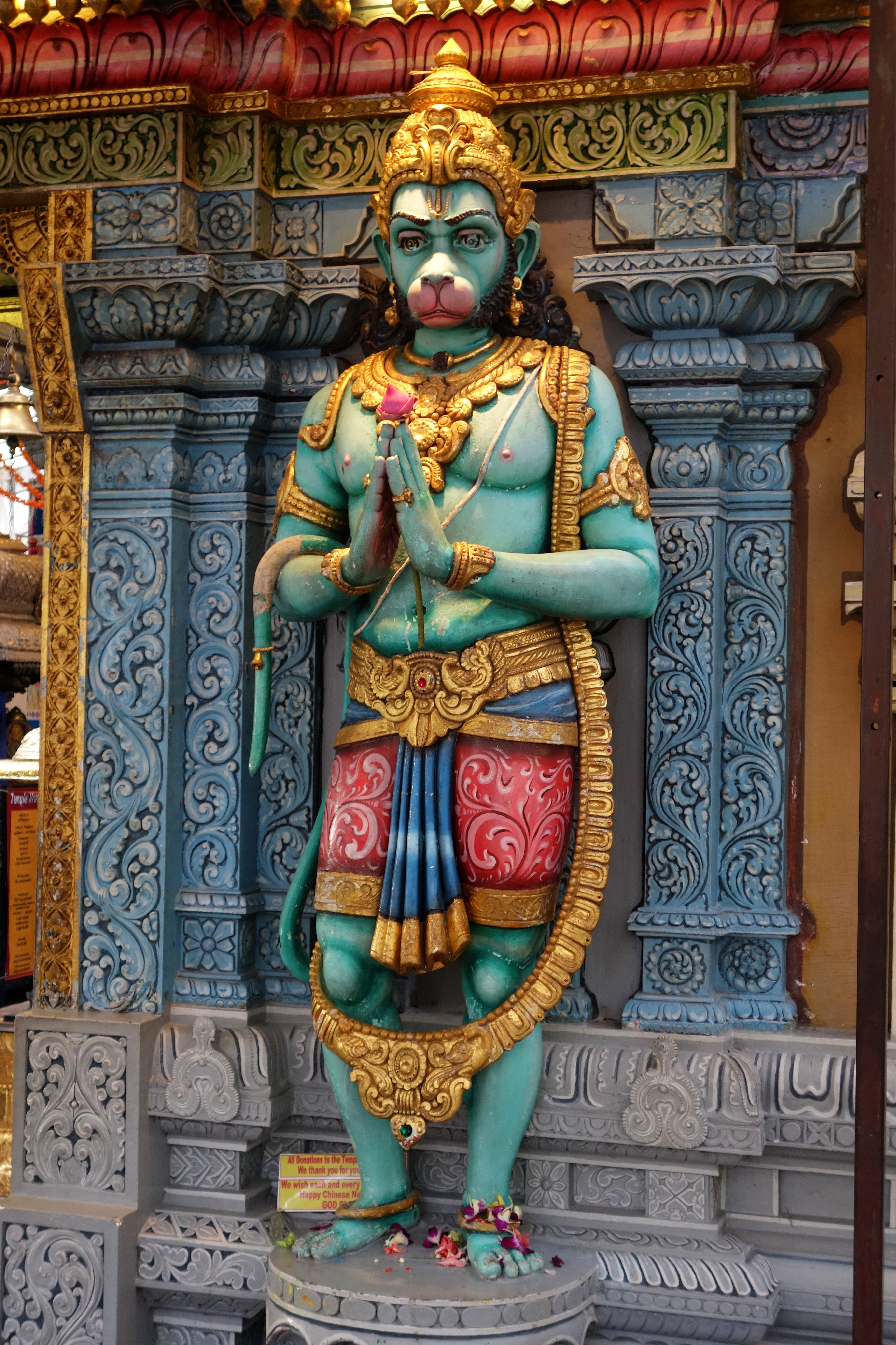 Hinduism in Singapore